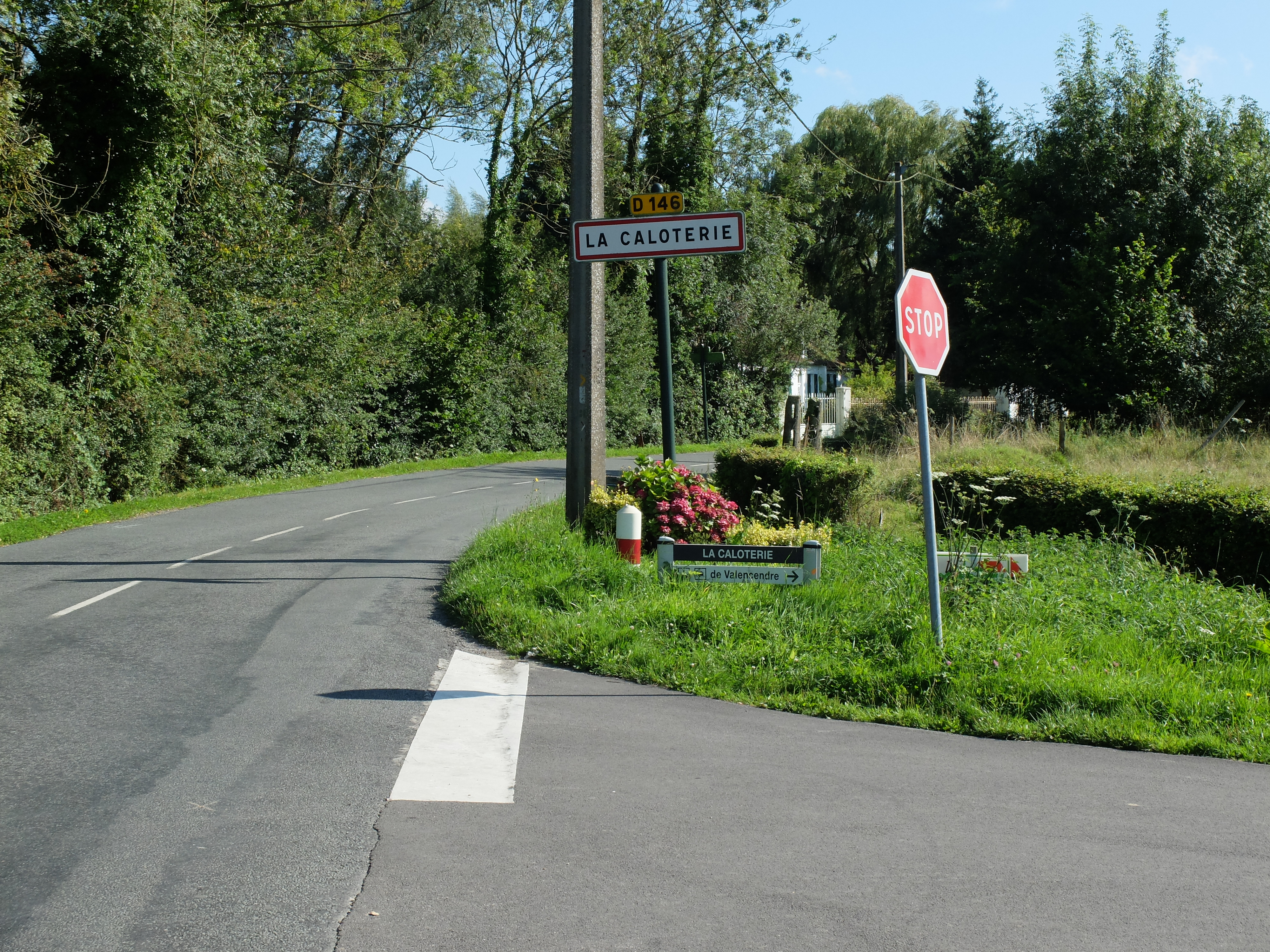 Vue d'une entrée de la commune de La Calotterie.